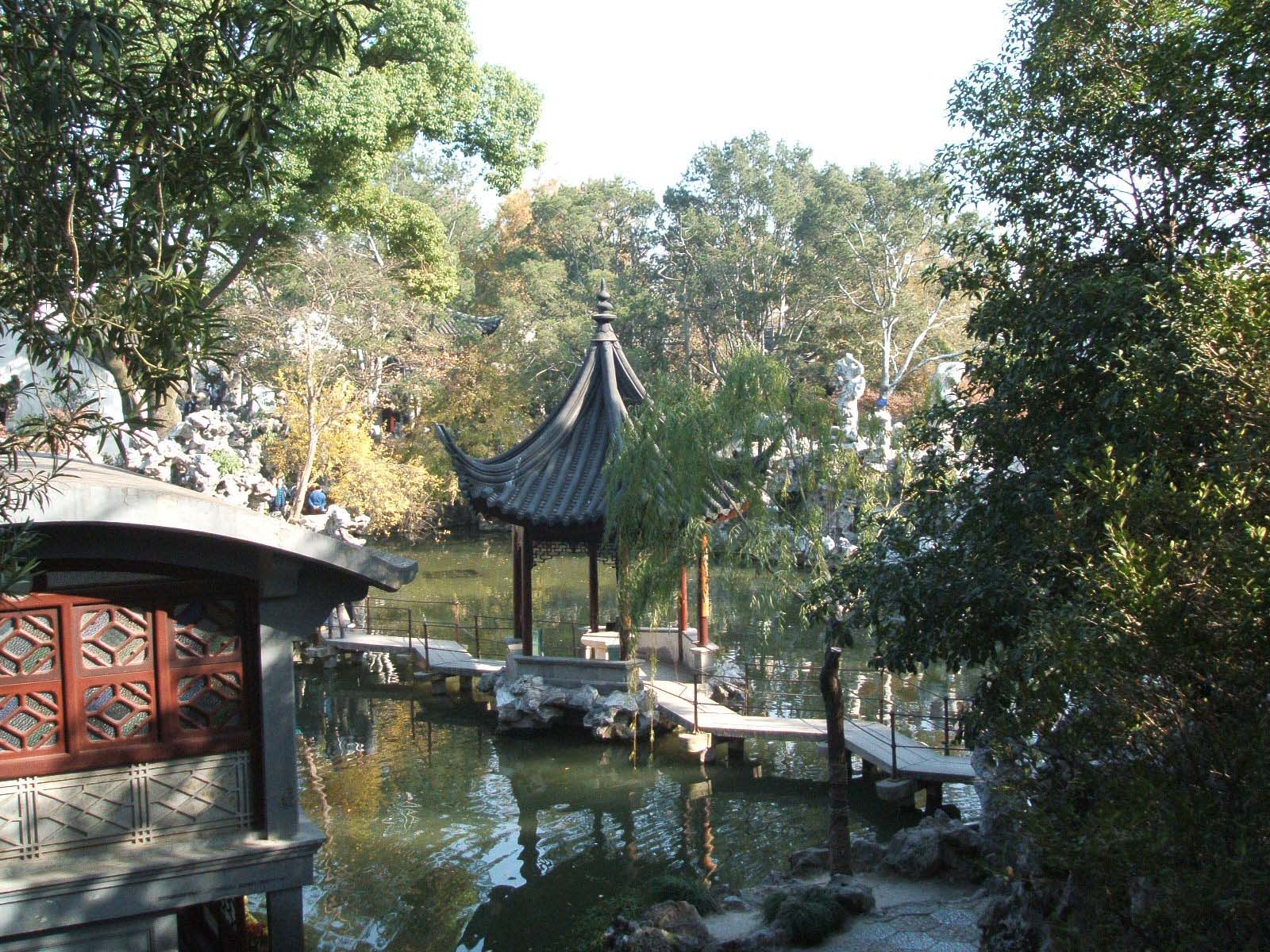 自己去狮子林时拍的照。